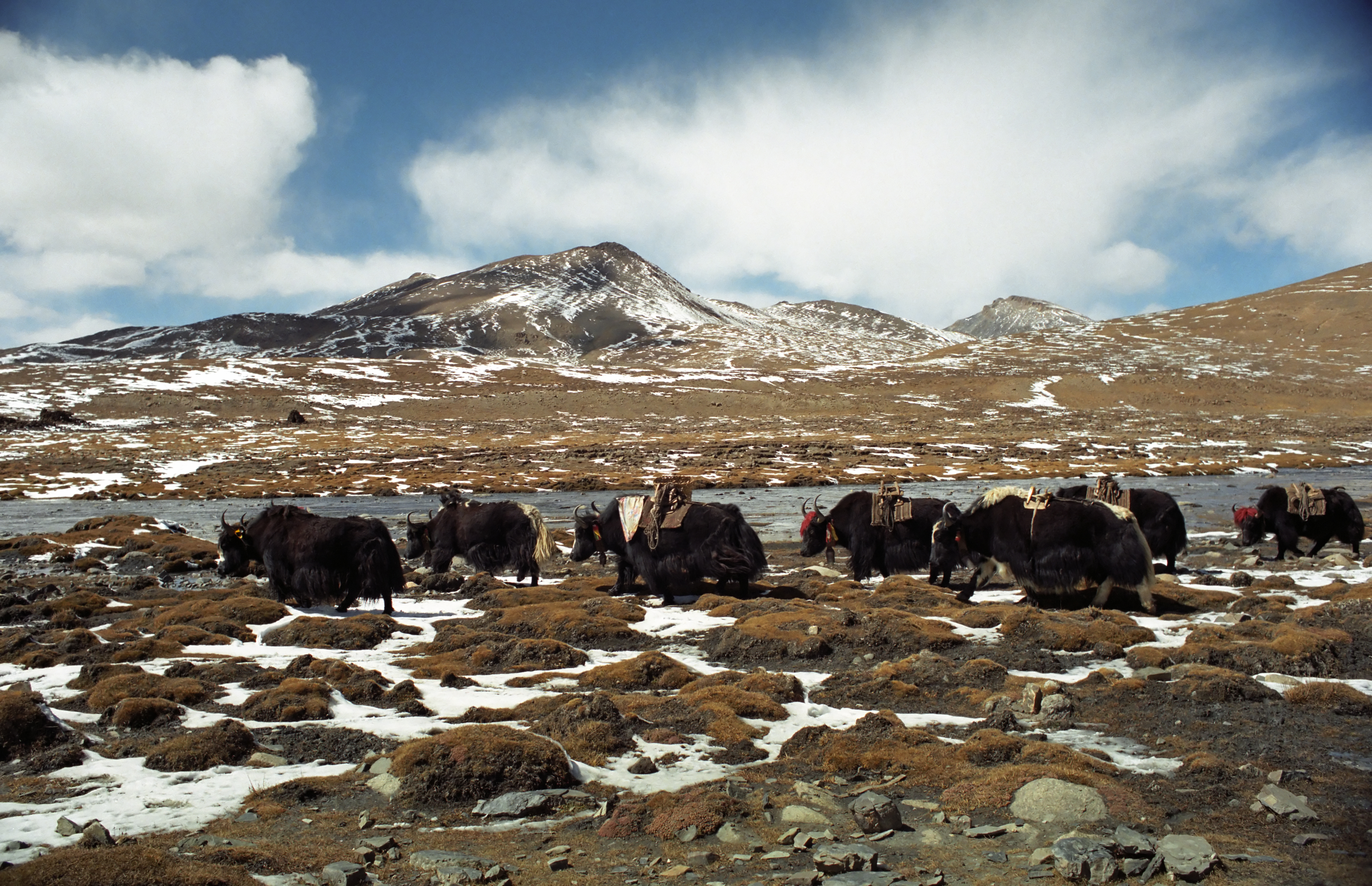 High pass near Rawok